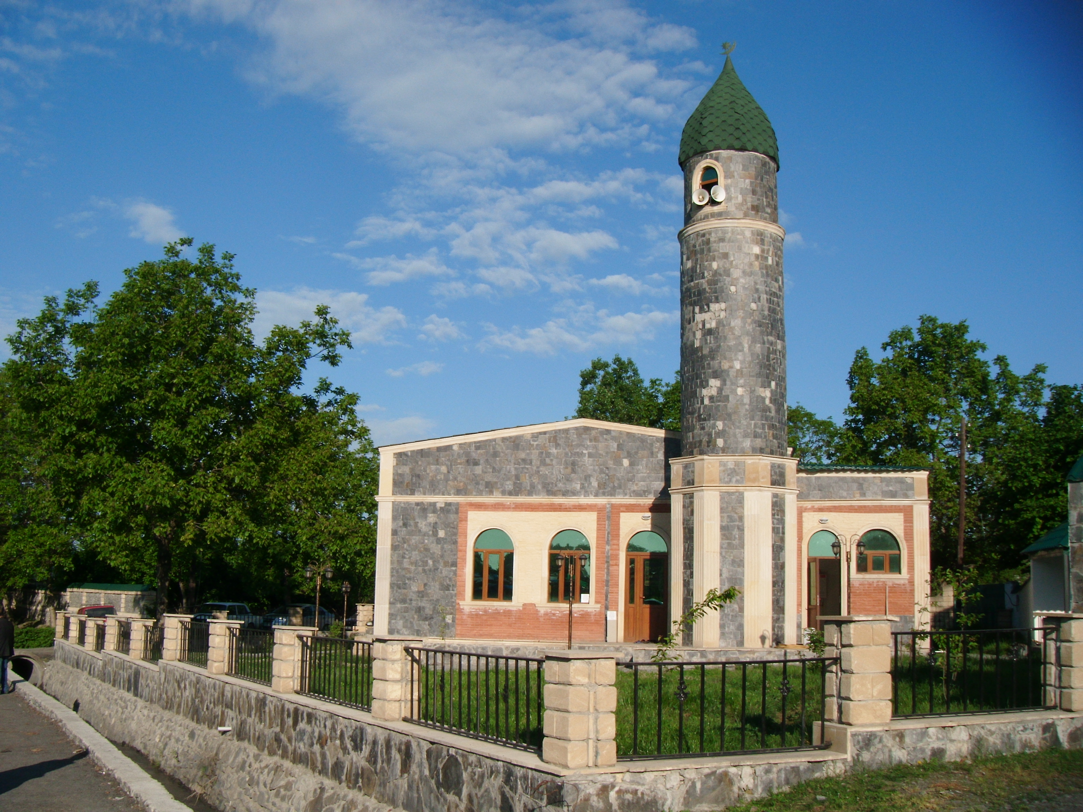 Qəbələ rayonu Nic qəsəbəsində yerləşən Yalaşlı məhəllə Cümə Məscidi